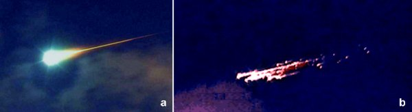 Abb.A zeigt ein Meteor-Ereignis das als Feuerkugel oder Bolide bezeichnet wird und man erkennt die beiden Plasmaphasen Abb.B ist ein zerschlagener Meteoroid in der letzten Flugphase als Bolide oder Feuerkugel